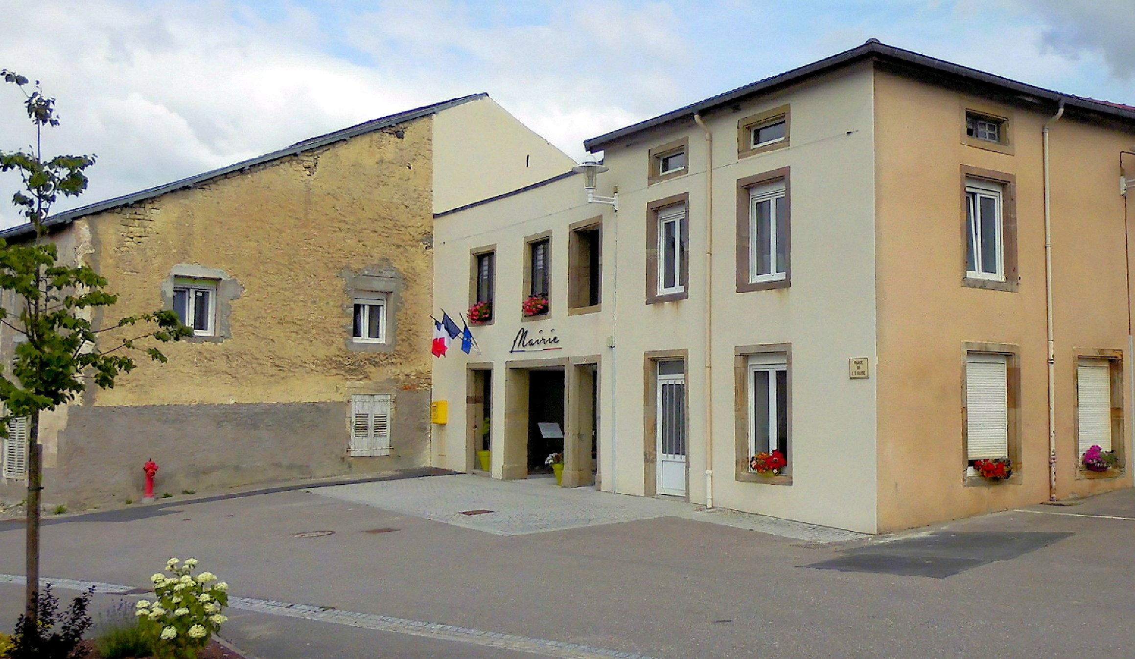 La mairie de La Neuveville-sous-Montfort